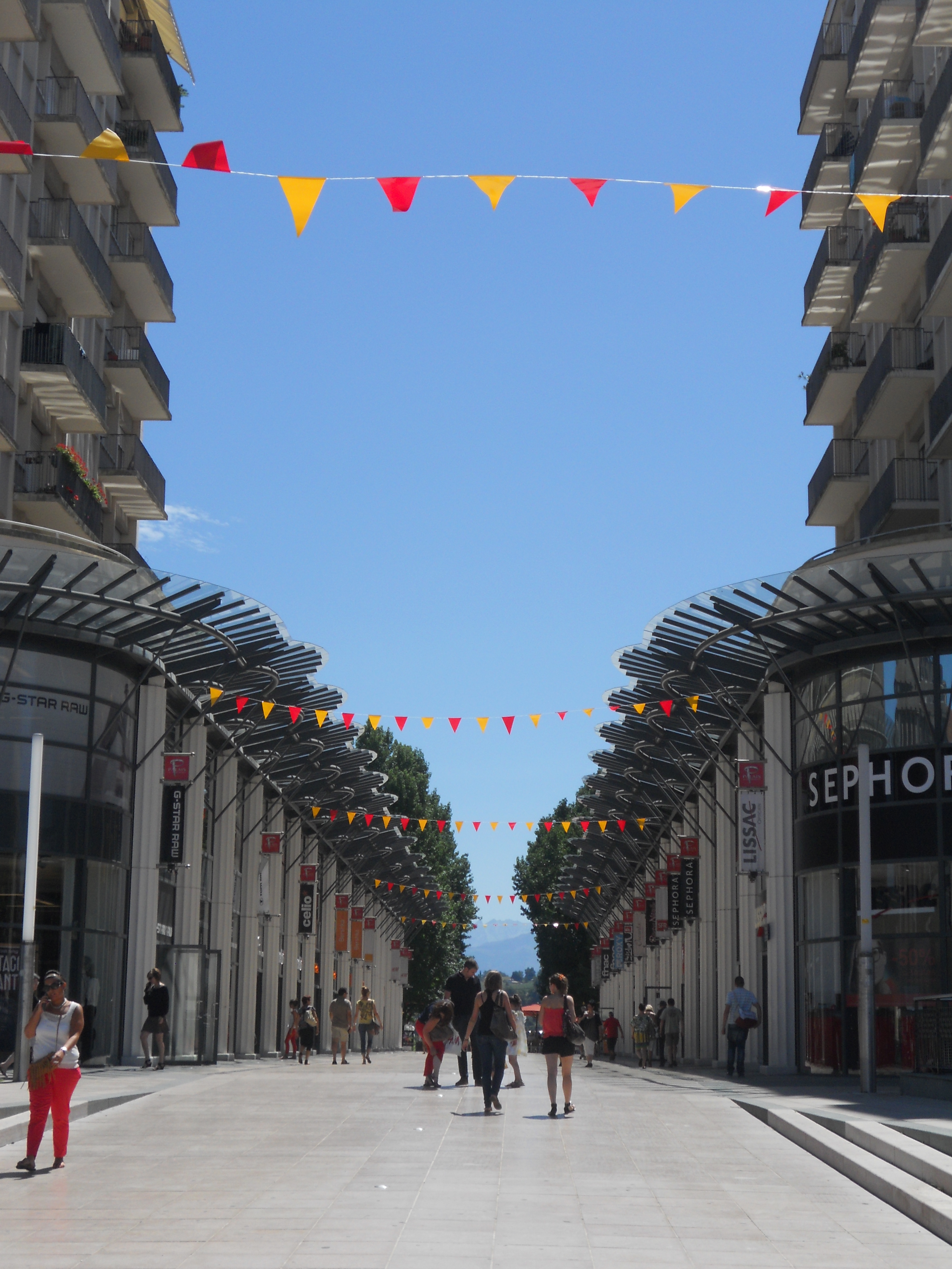 Palais des Pyrénées à Pau